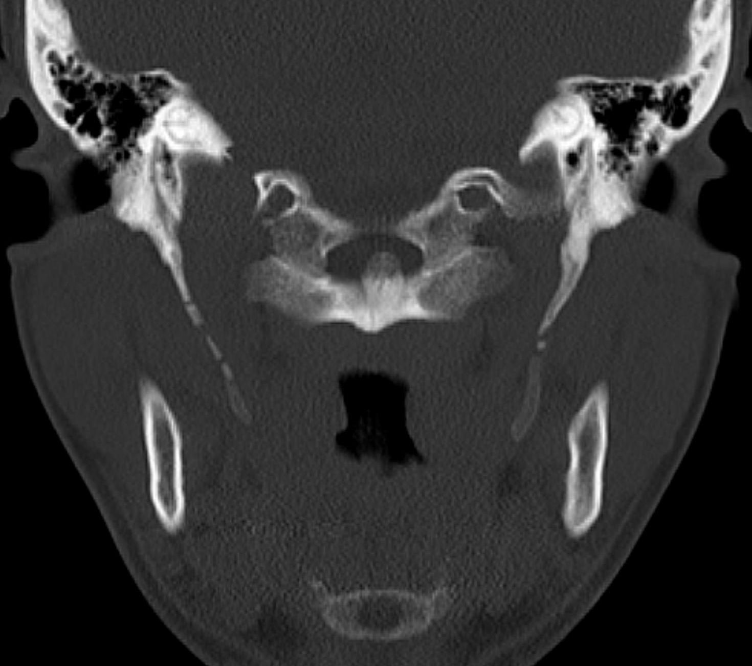 Verlängerter Processus styloideus und Ossifikationen im Ligamentum stylohyoideum als Zufallsbefund. Beschwerden nicht bekannt.